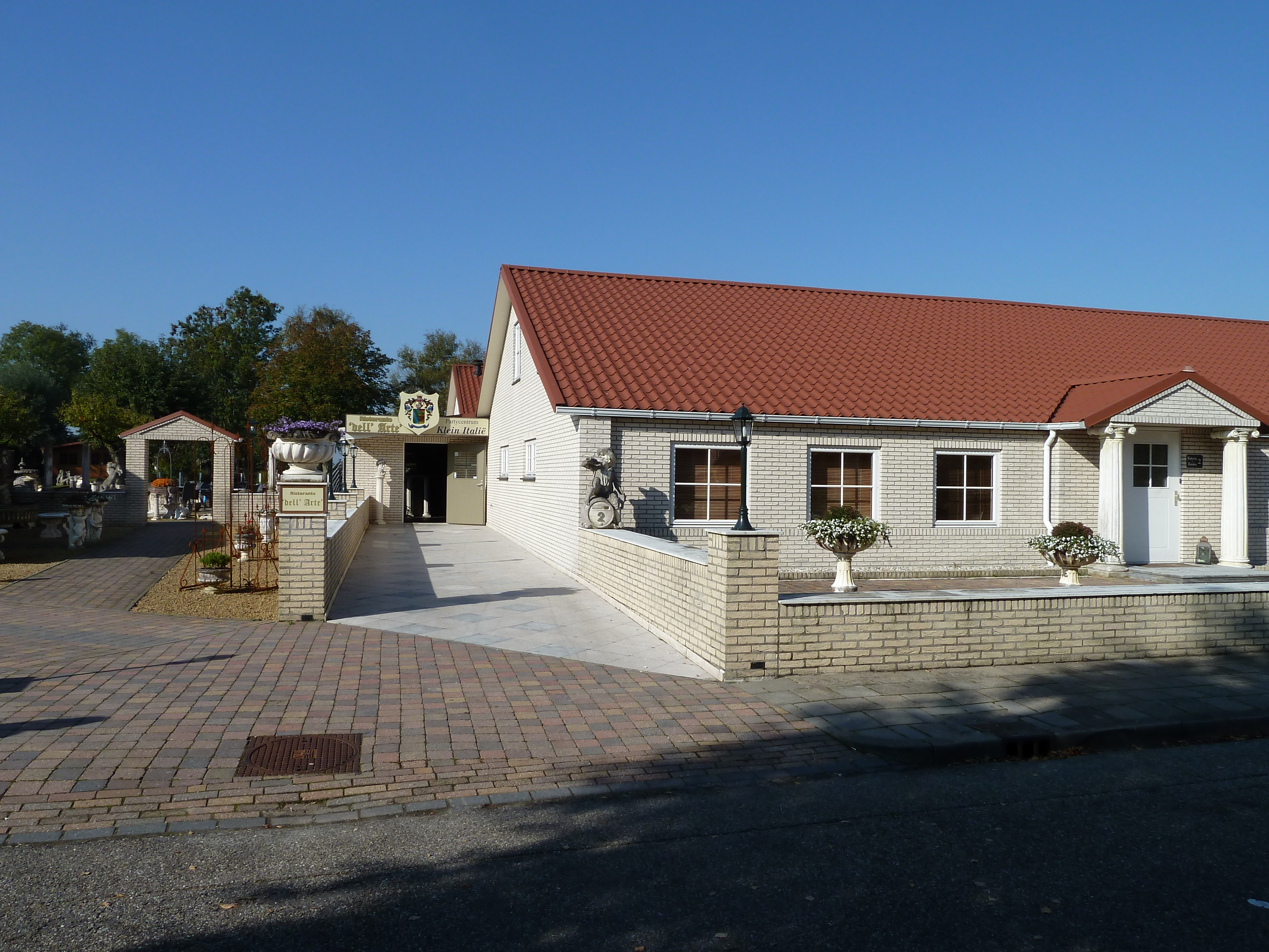 Beeldentuin Klein Italië met restaurant Dell 'Arte, partycentrum Klein Italië, eetcafé 't Kippenhok en de marmerhandel van Roberto Santanera, de zoon van 'marmerkoning' Bruno Santanera in Godlinze.